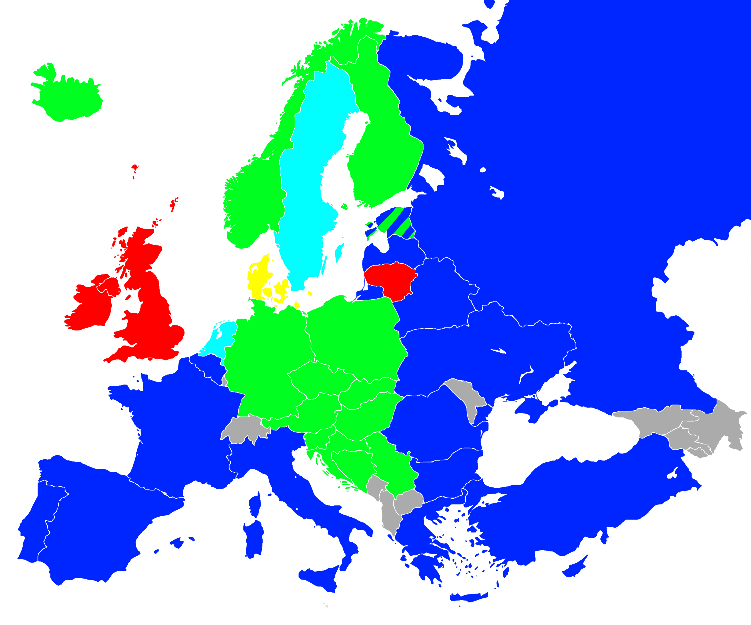 Preferované značení not v Evrope solmizační slabiky (Si,La diesis, Si bemolle) Anglický systém (B, A#, Bb) Německý systém (H, Ais,B) Nizozemský systém (B, Ais,Bes) Dánský systém (H, A#, Bb) nezjištěno